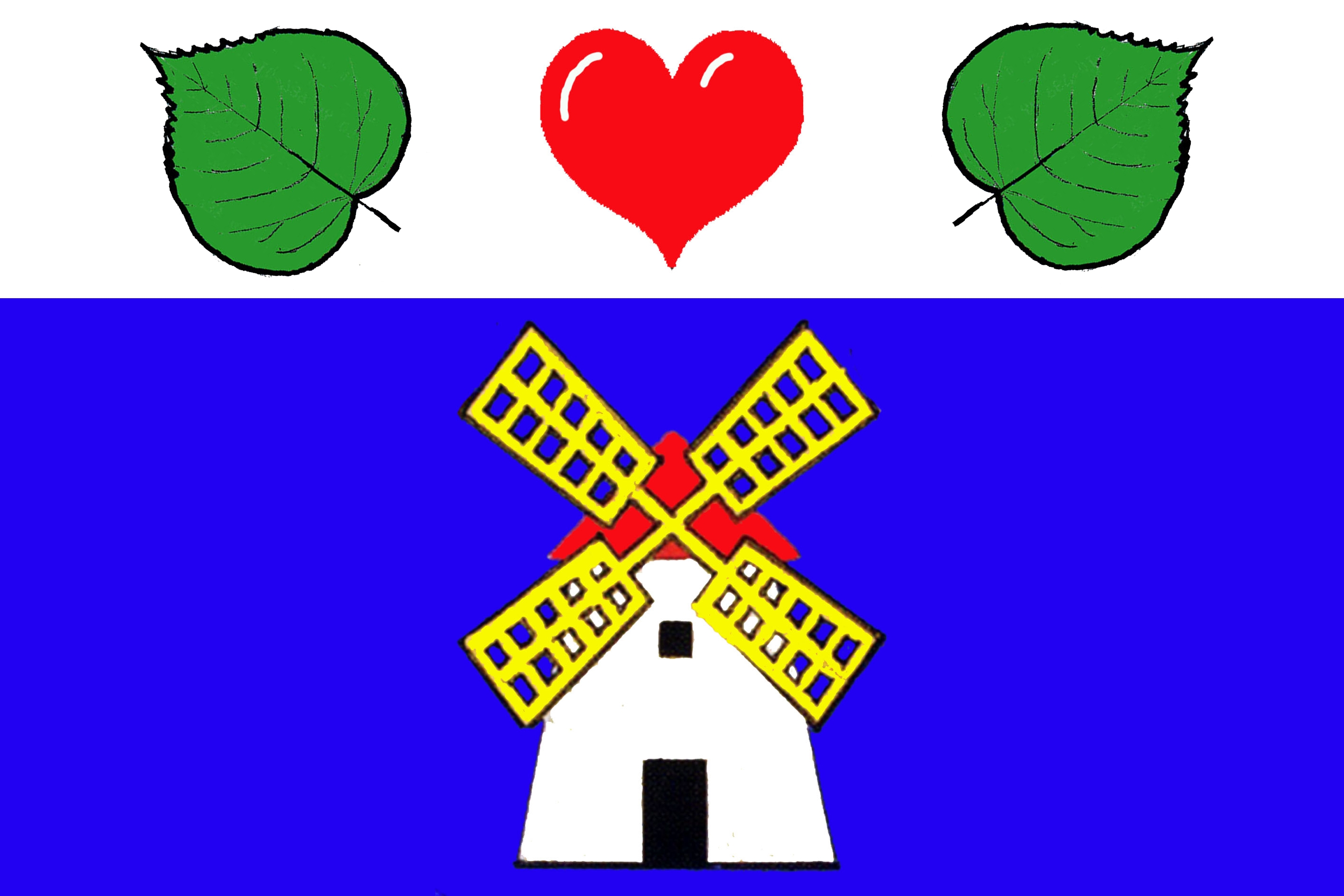 Česky: prapor obce Police